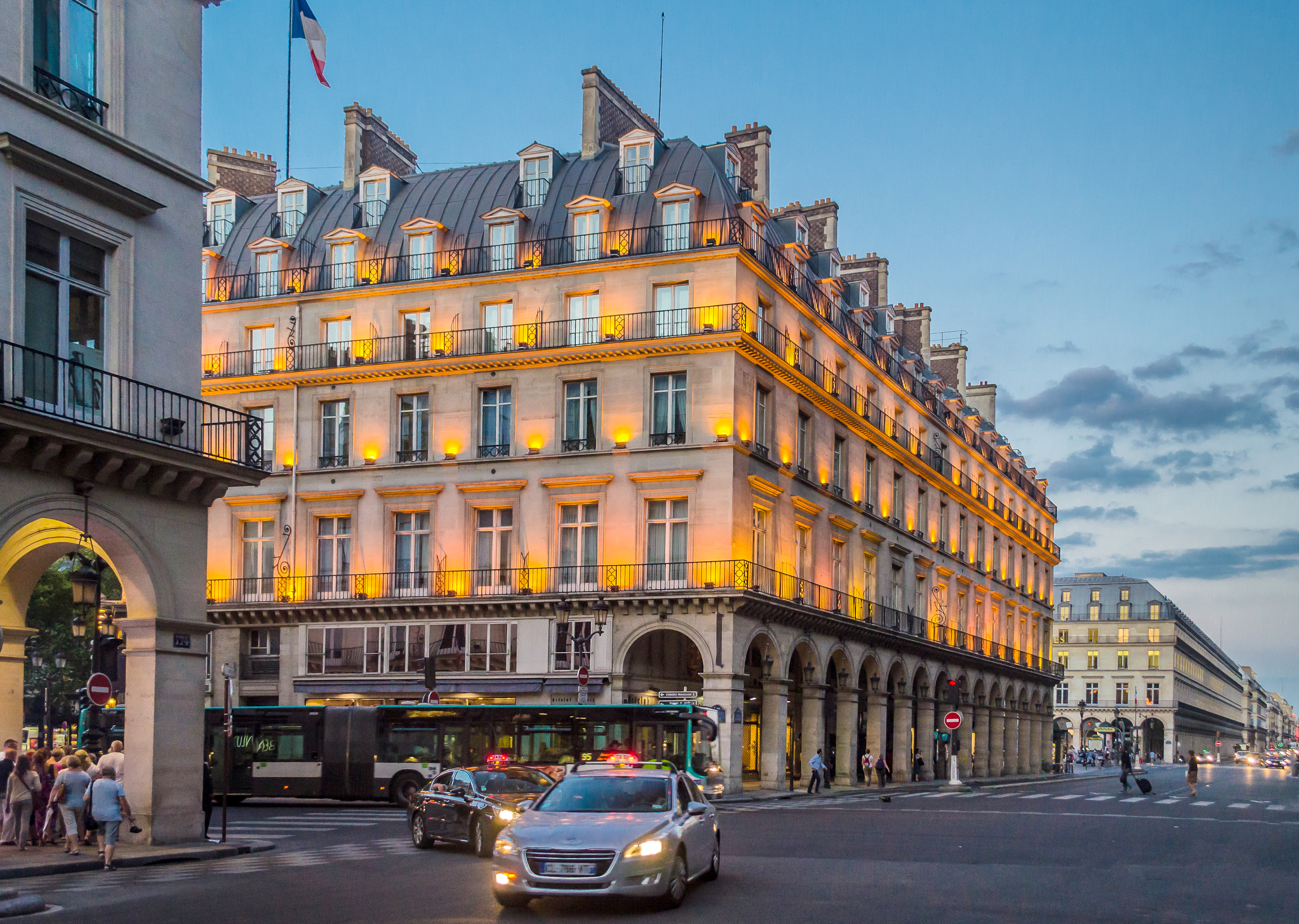 Rue de Rivoli at night, Paris.